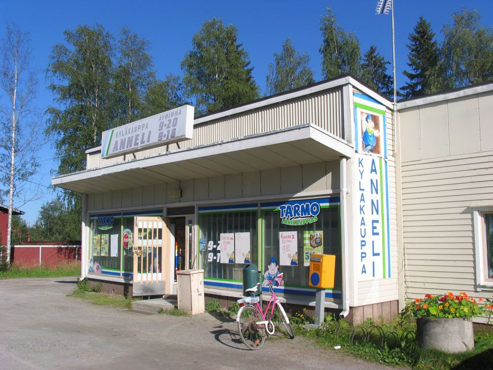 Louhioja shop, Eno